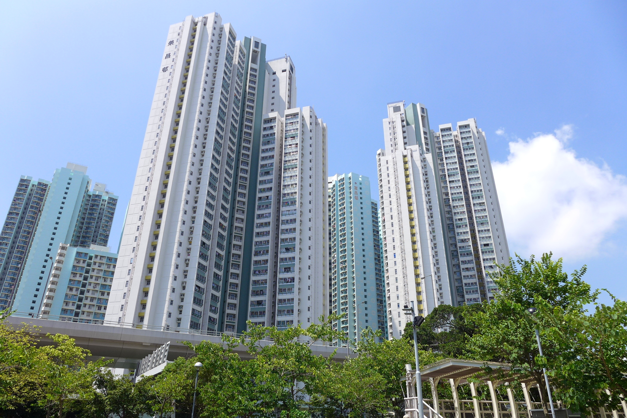 Wing Cheong Estate